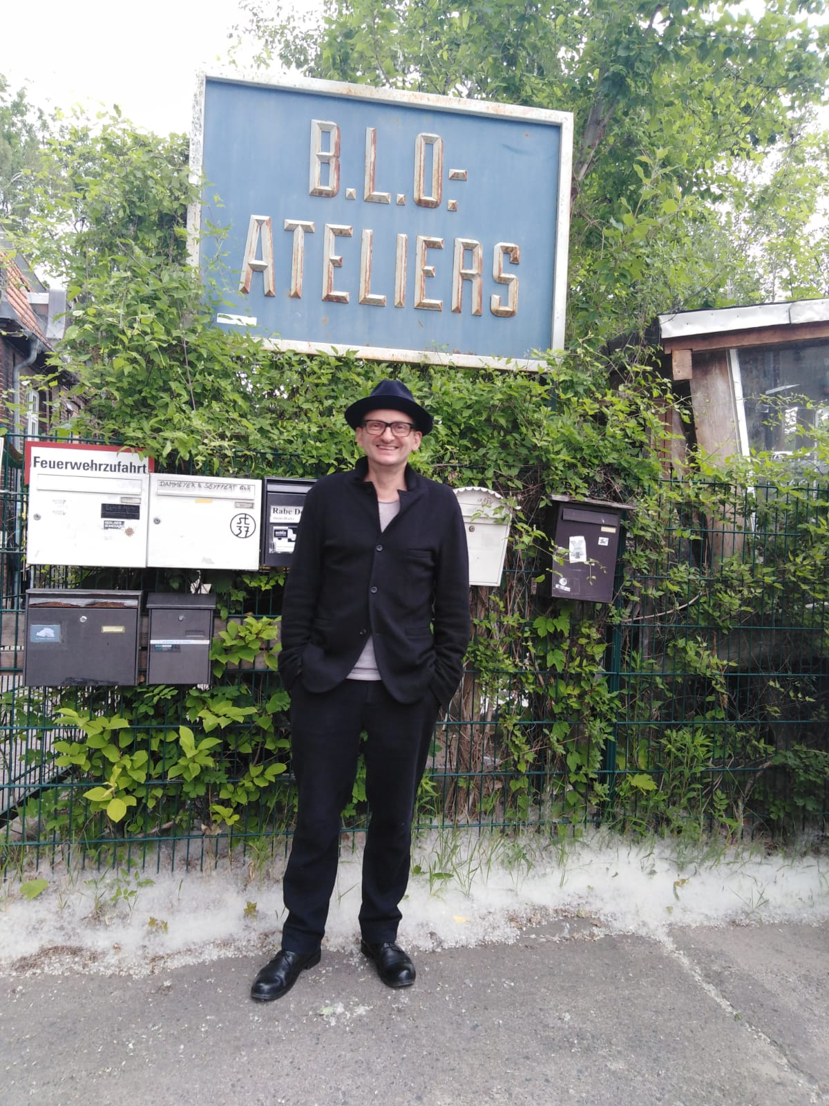 Milan Peschel ist ein Freund der B.L.O.-Ateliers